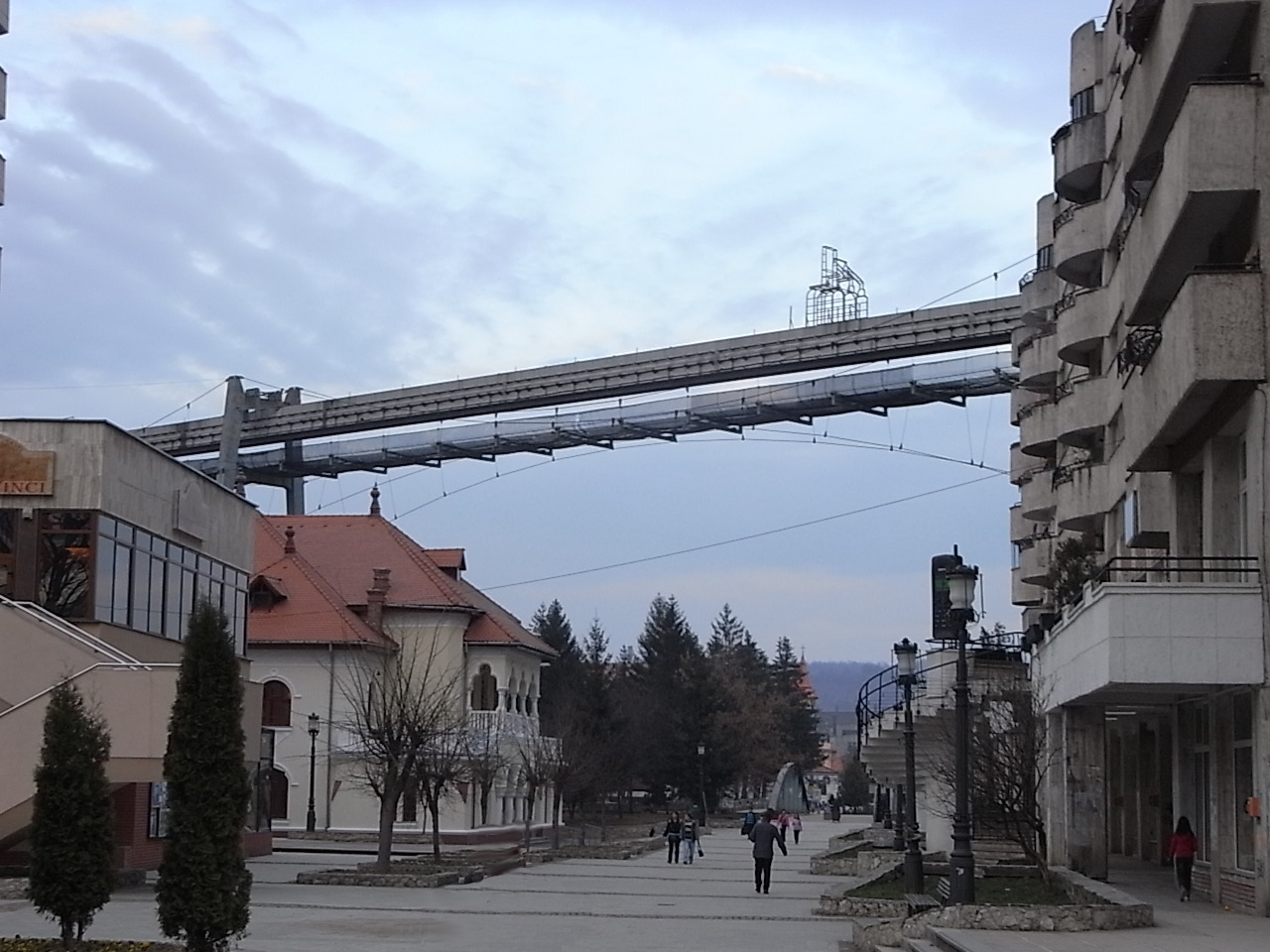 Reschitz (Reșița), die Materialseilbahn, im Hintergrund die erste genietete Brücke in Rumänien, über die Bârzava.